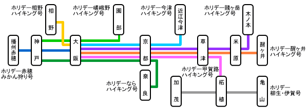 ホリデーハイキング号 運転系統図